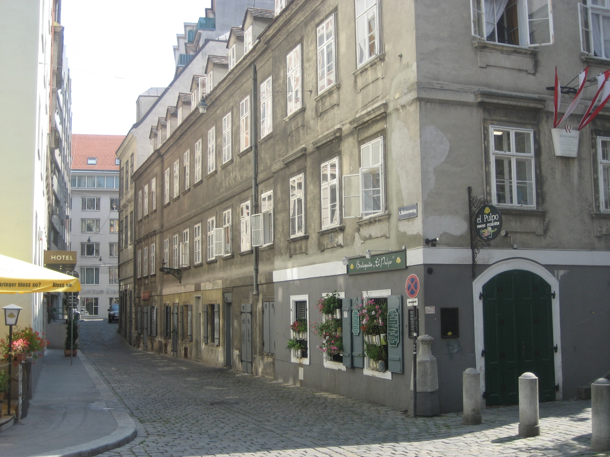 das Haus Hafnersteig 6 im 1. Bezirk, in Wien